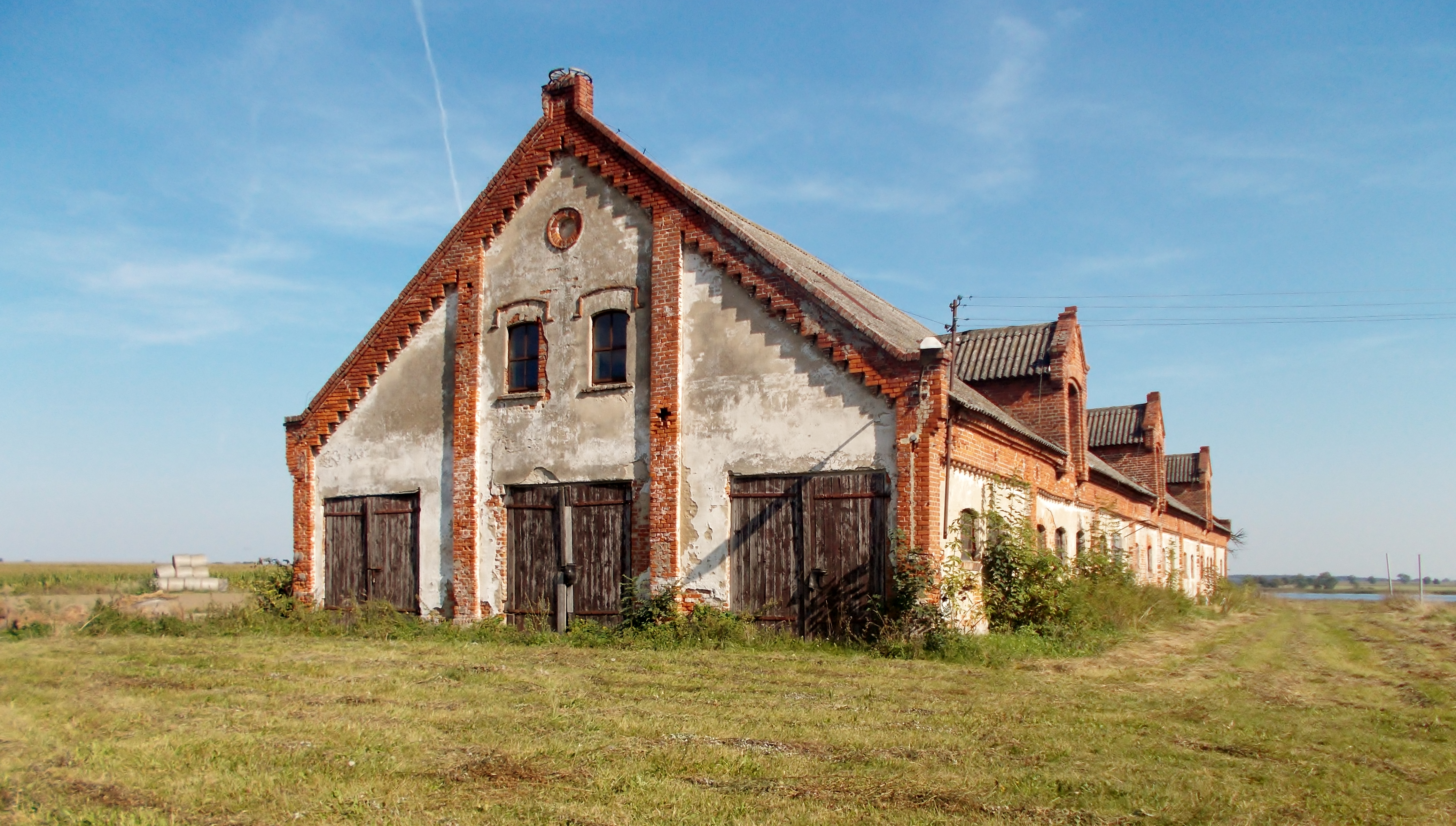 Komorowo, owczarnia, 2 poł. XIX